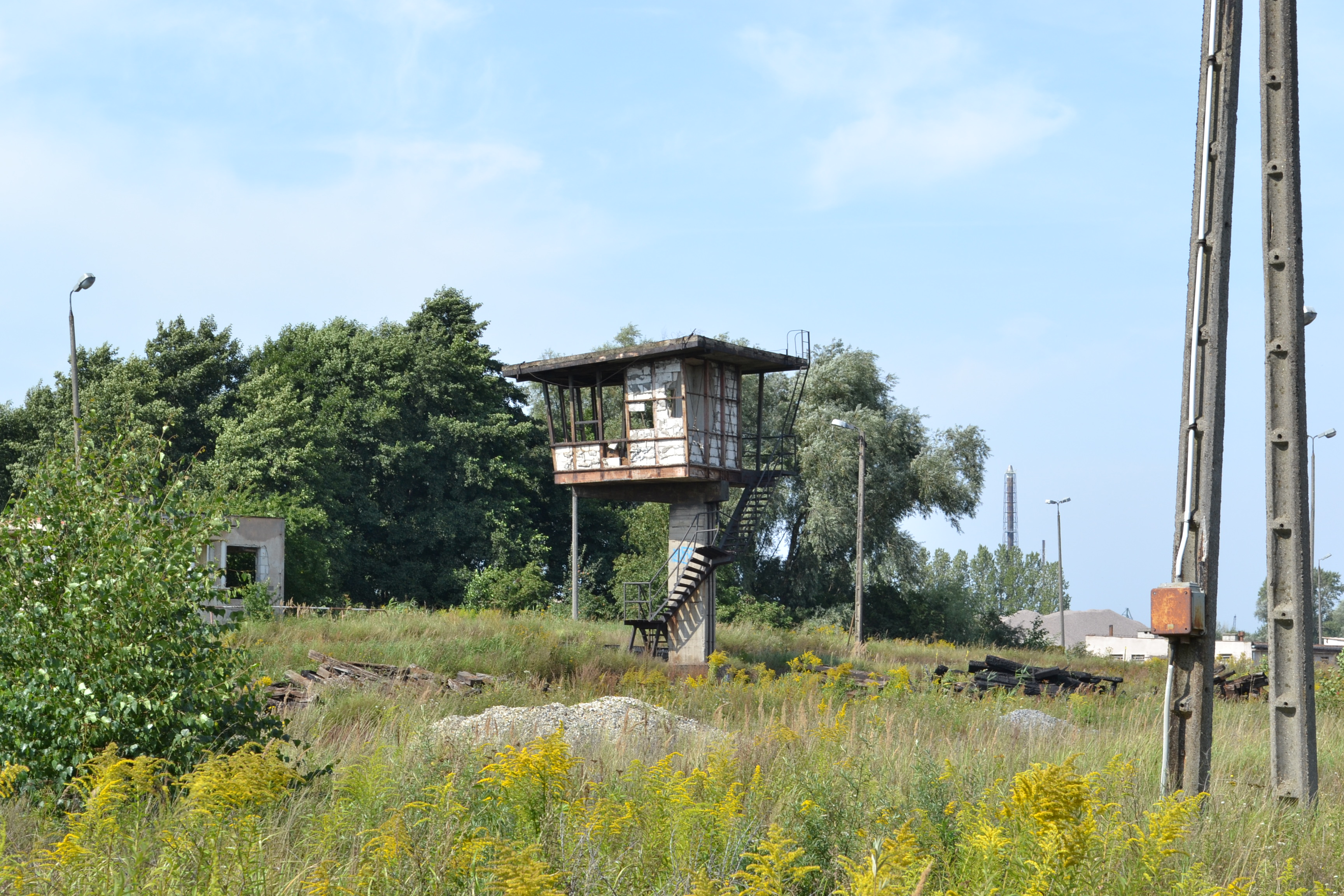 nastawnia w Gdańsku Porcie Północnym